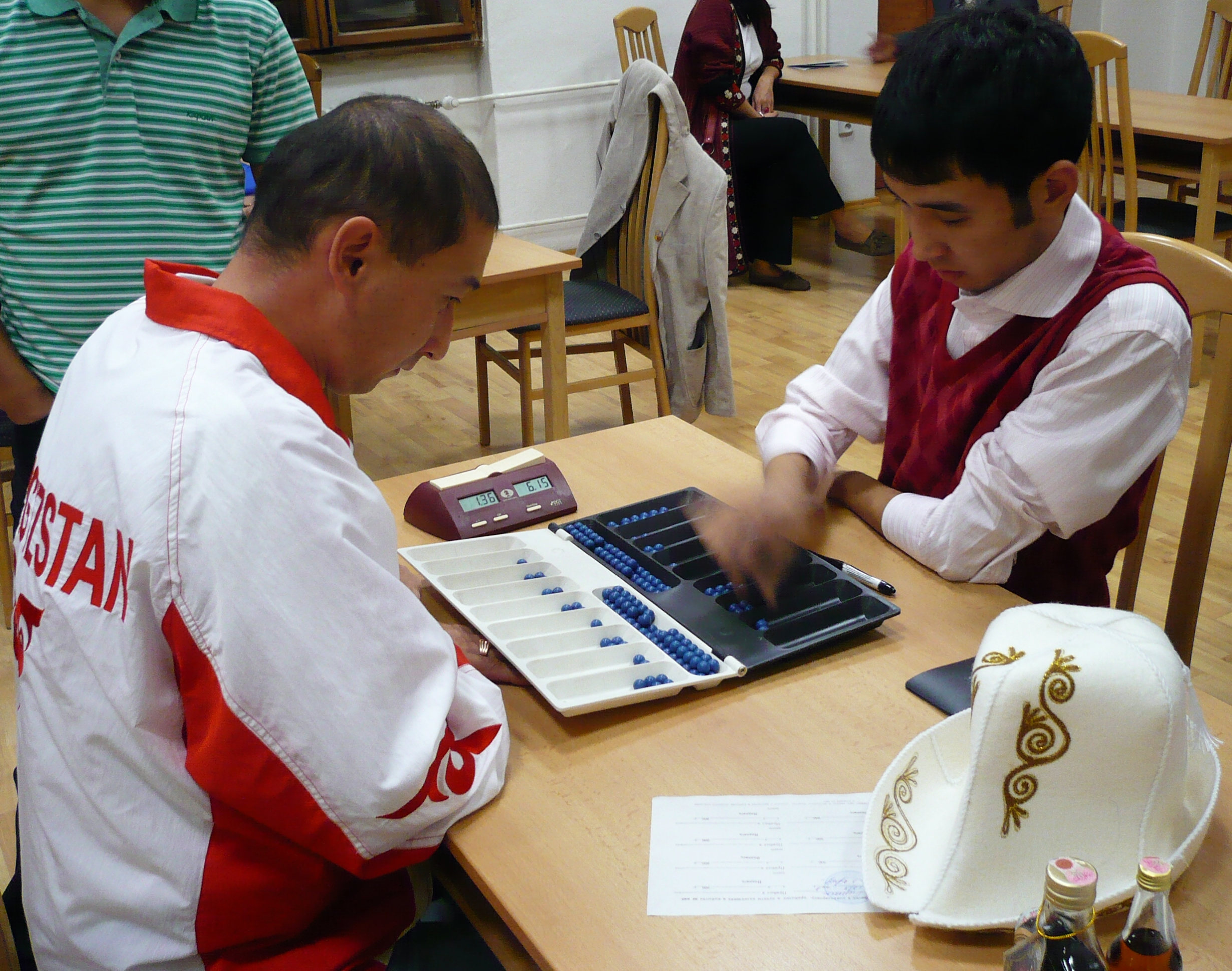 Deskohraní 2008